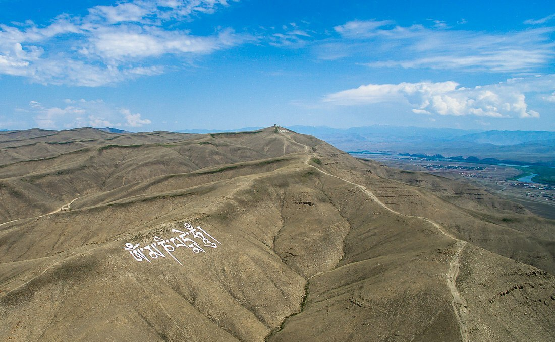 На горе в Туве из камней выложена самая большая буддийская мантра в мире. Её длина 120 метров, на покраску понадобилось 500 кг белой краски. Мантру можно увидеть из каждого уголка города Кызыла.